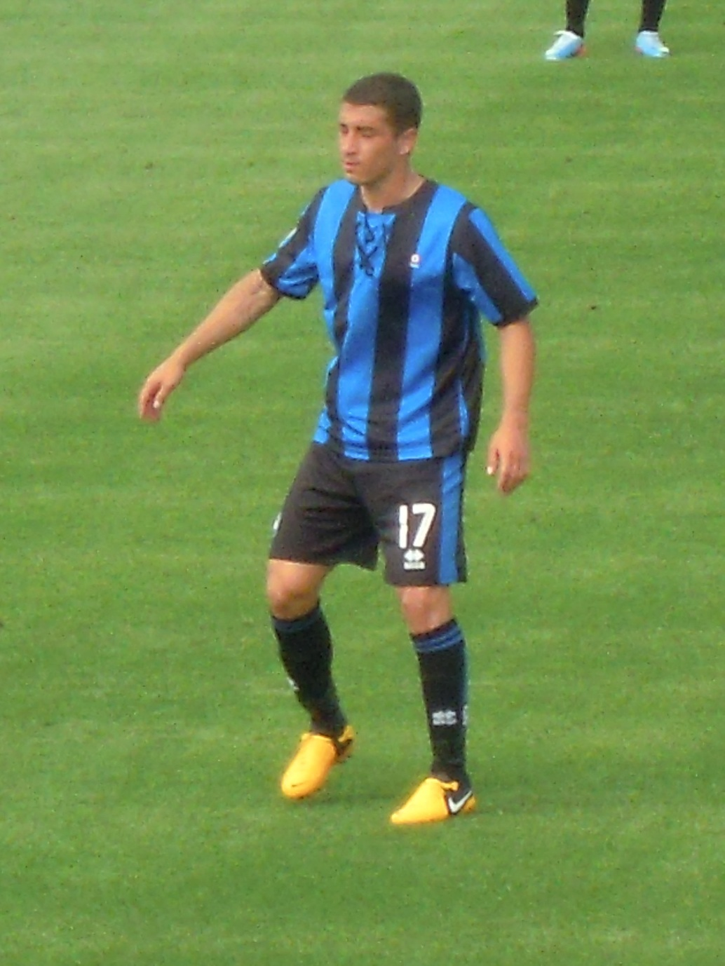 Carlos Carmona, calciatore cileno